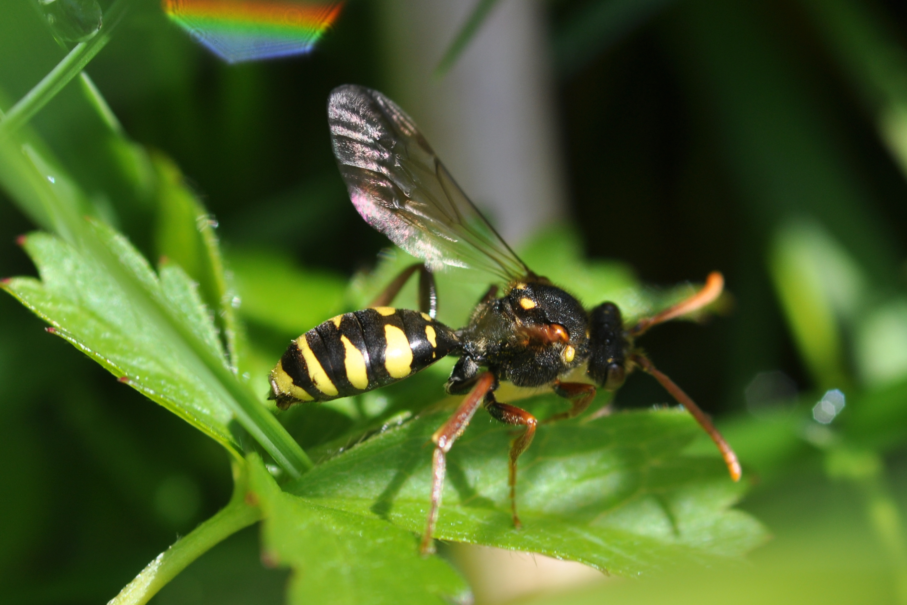 Wespenbiene Nomada marshamella Weibchen in Altona, Hamburg.